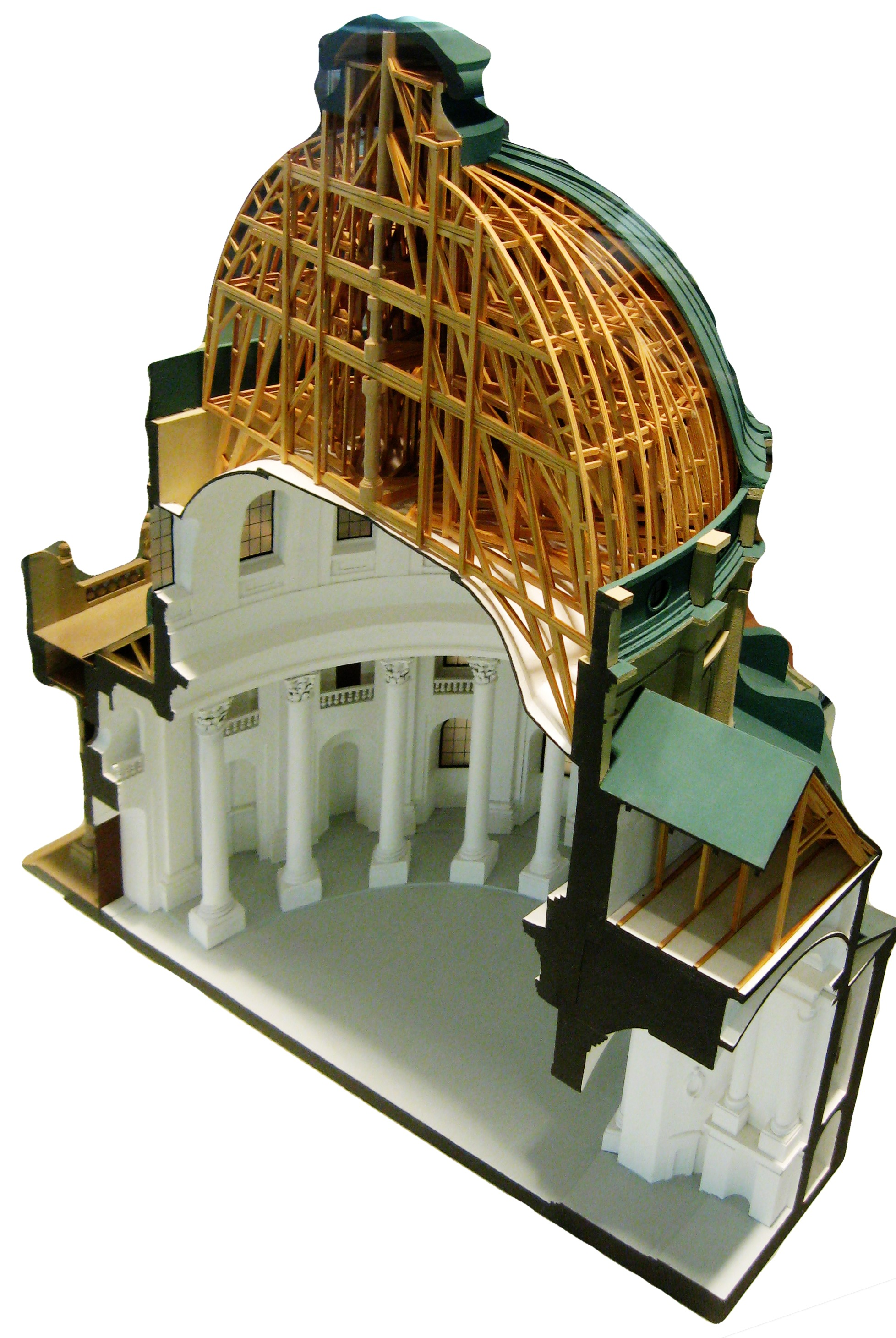 Koppelkonstruktion im Dom in Sankt Blasien